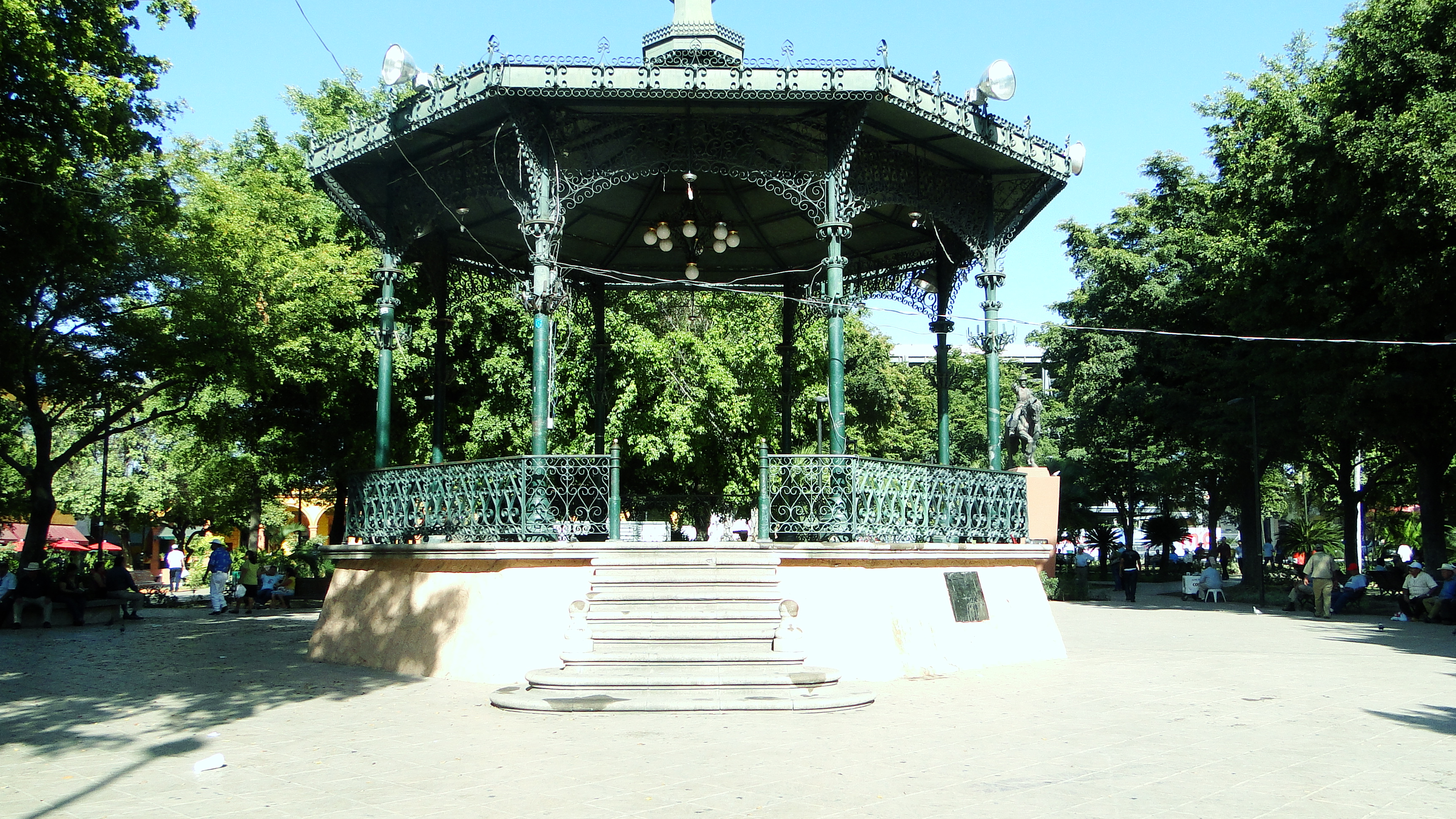 Kiosco de la plazuela Álvaro Obregón.